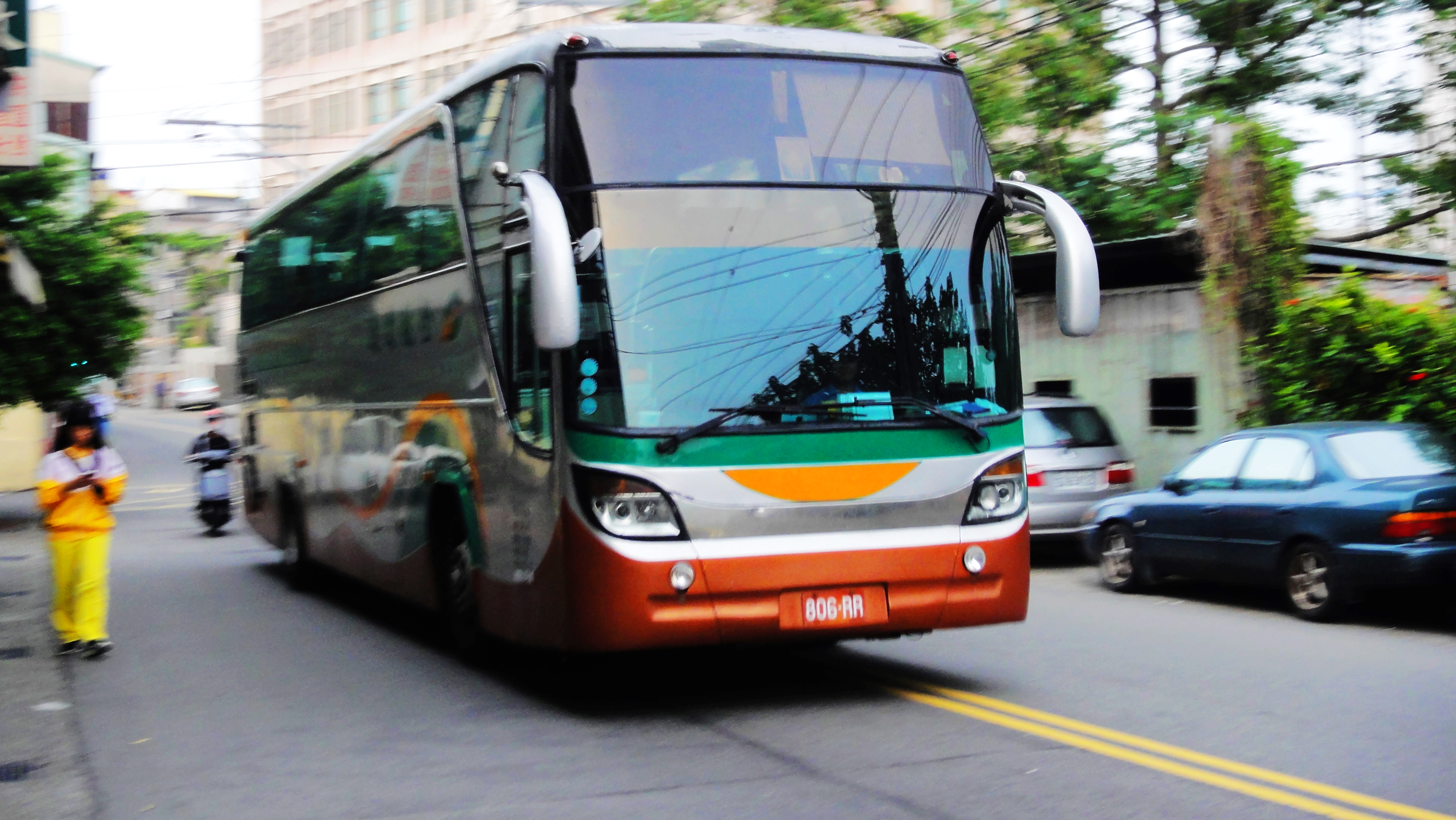 全航客運遊覽車806-RR(原豐榮客運轉籍車輛)